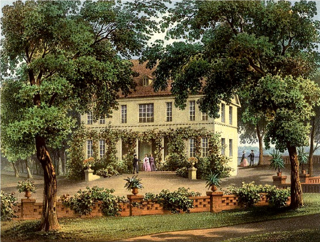 Rittergut Radojewo, Kreis Posen